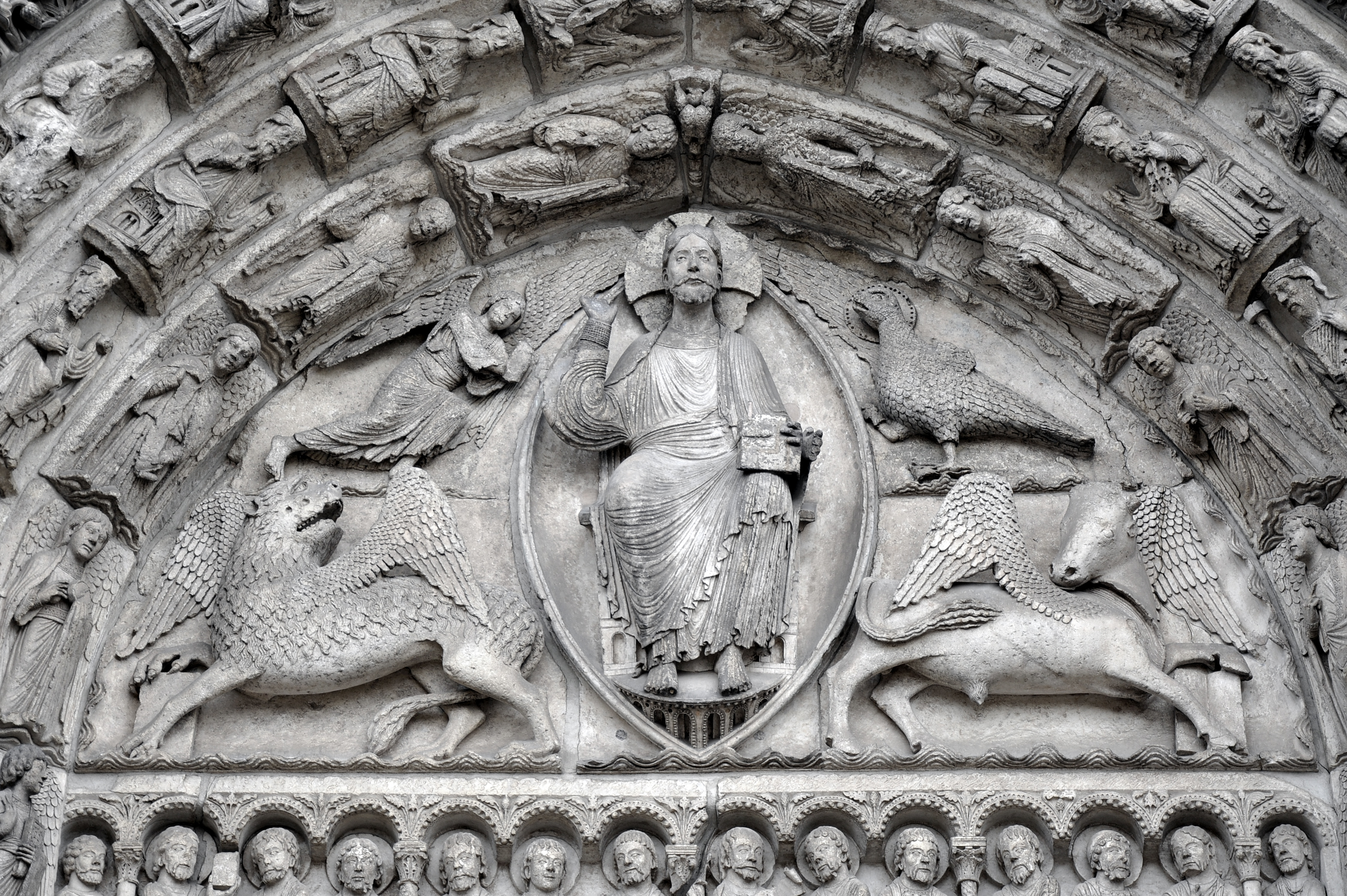 Tympan du portail central du Portail Royal de la cathédrale de Chartres.